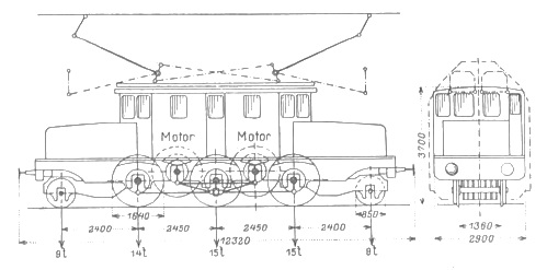 SBB-Drehstromlokomotive Fb 3/5: Typenskizze